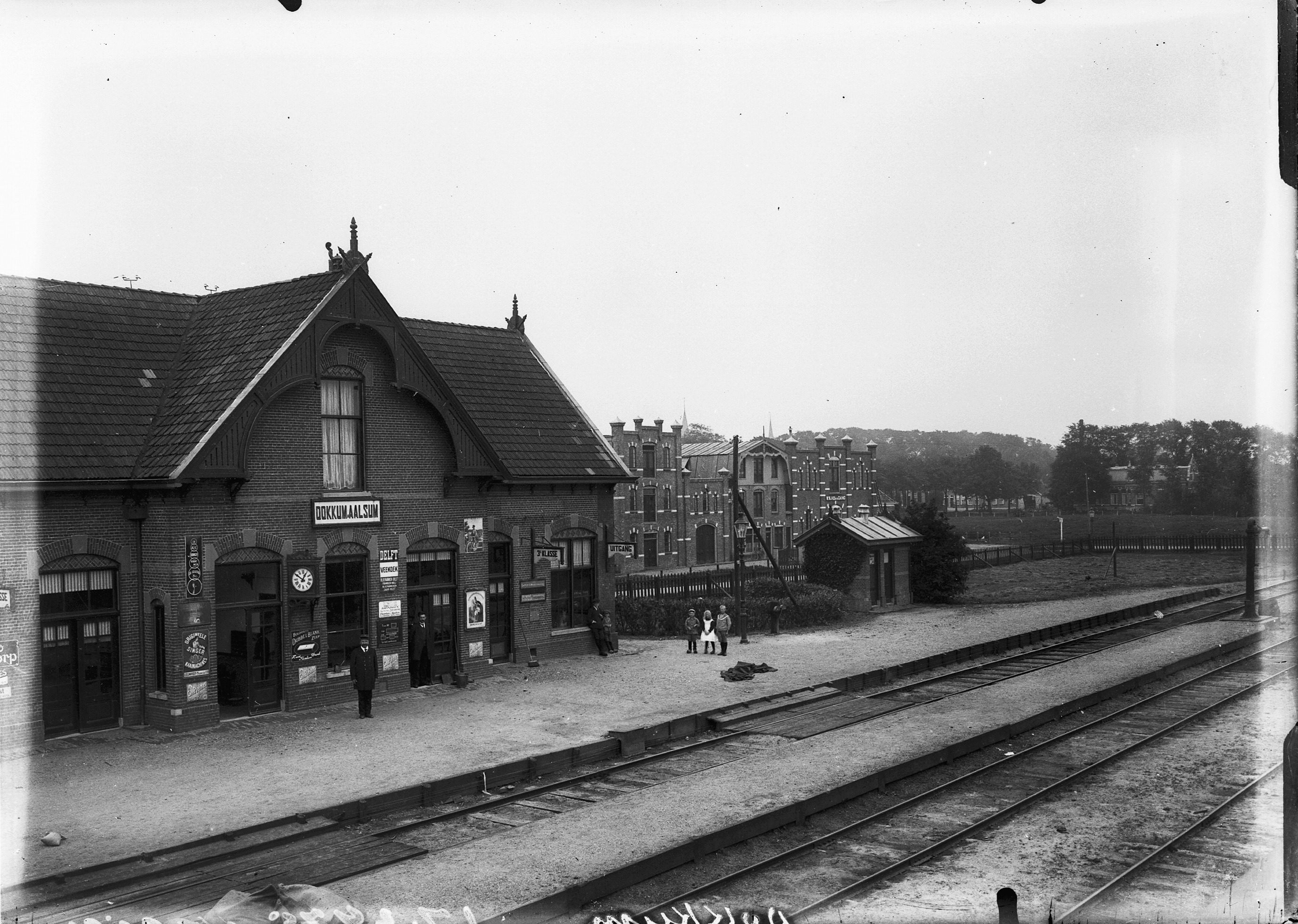 Diversen: station Dokkum - Aalsum